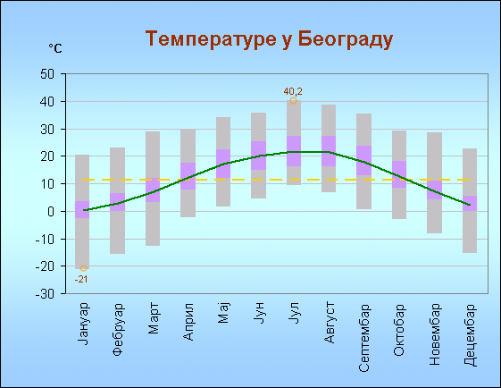 Графички приказ температура у Београду од 1961. до 1990. године. Урадио Matija, 11.11.2006, према подацима Републичког хидрометеоролошког завода Србије и предао у јавно власништво.